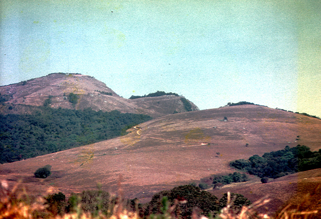 Zomba Plateau im Shire Hochland in Malawi in Afrika